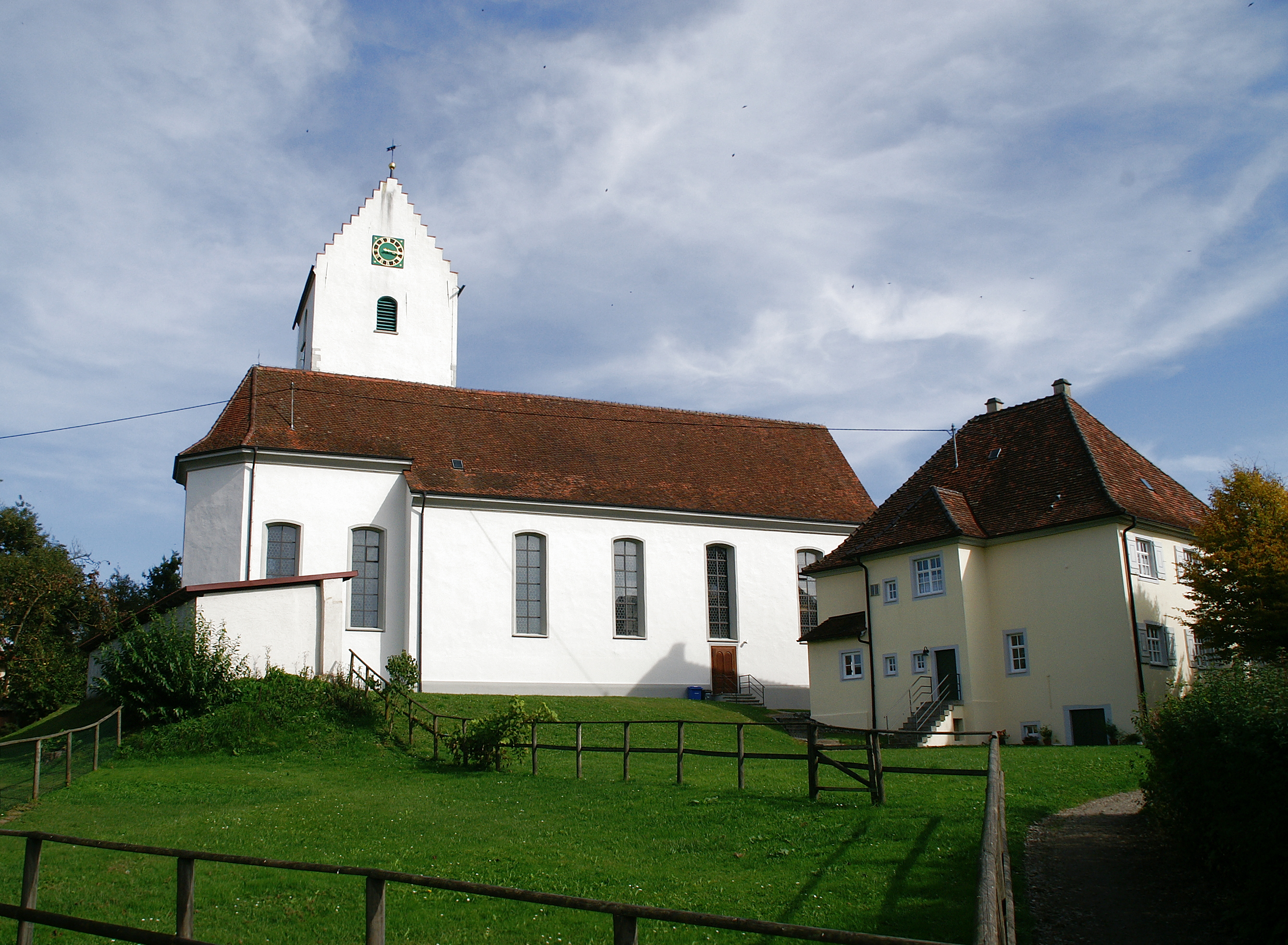 Die katholische Cosmas und Daminan-Kirche in D-78355 Hohenfels, Ortsteil Liggersdorf von Westen mit KONIKA MINOLTA 7D